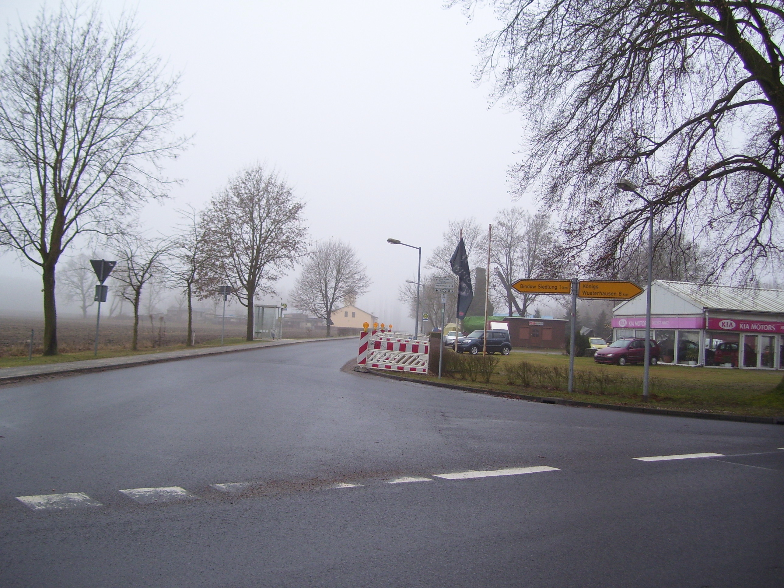 Bindow-Siedlung Dorfeingang